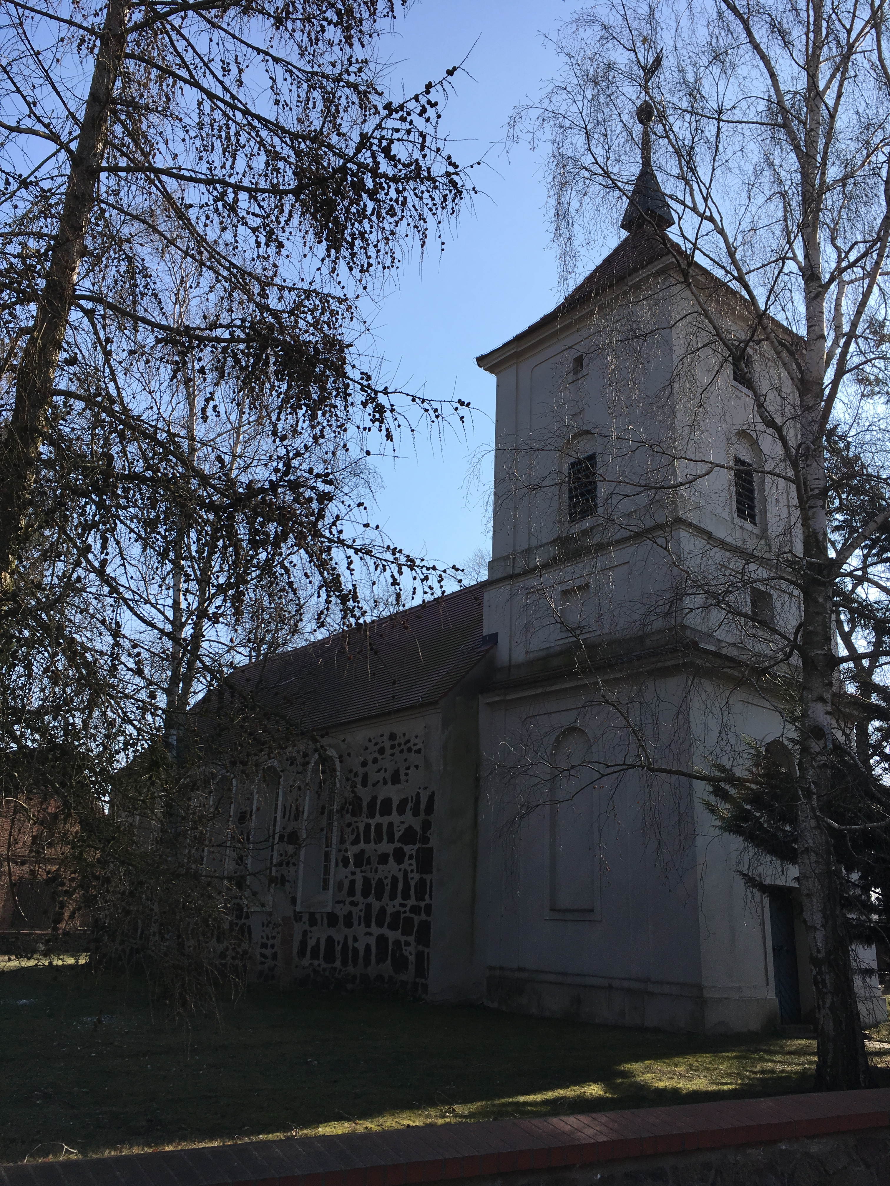 Die Dorfkirche Brachwitz ist eine spätgotische Saalkirche in Brachwitz, Stadt Treuenbrietzen im Landkreis Potsdam-Mittelmark. Sie wurde überwiegend aus Raseneisensteinen errichtet. In ihrem Innern steht unter anderem ein Kanzelaltar aus der ersten Hälfte des 18. Jahrhunderts.